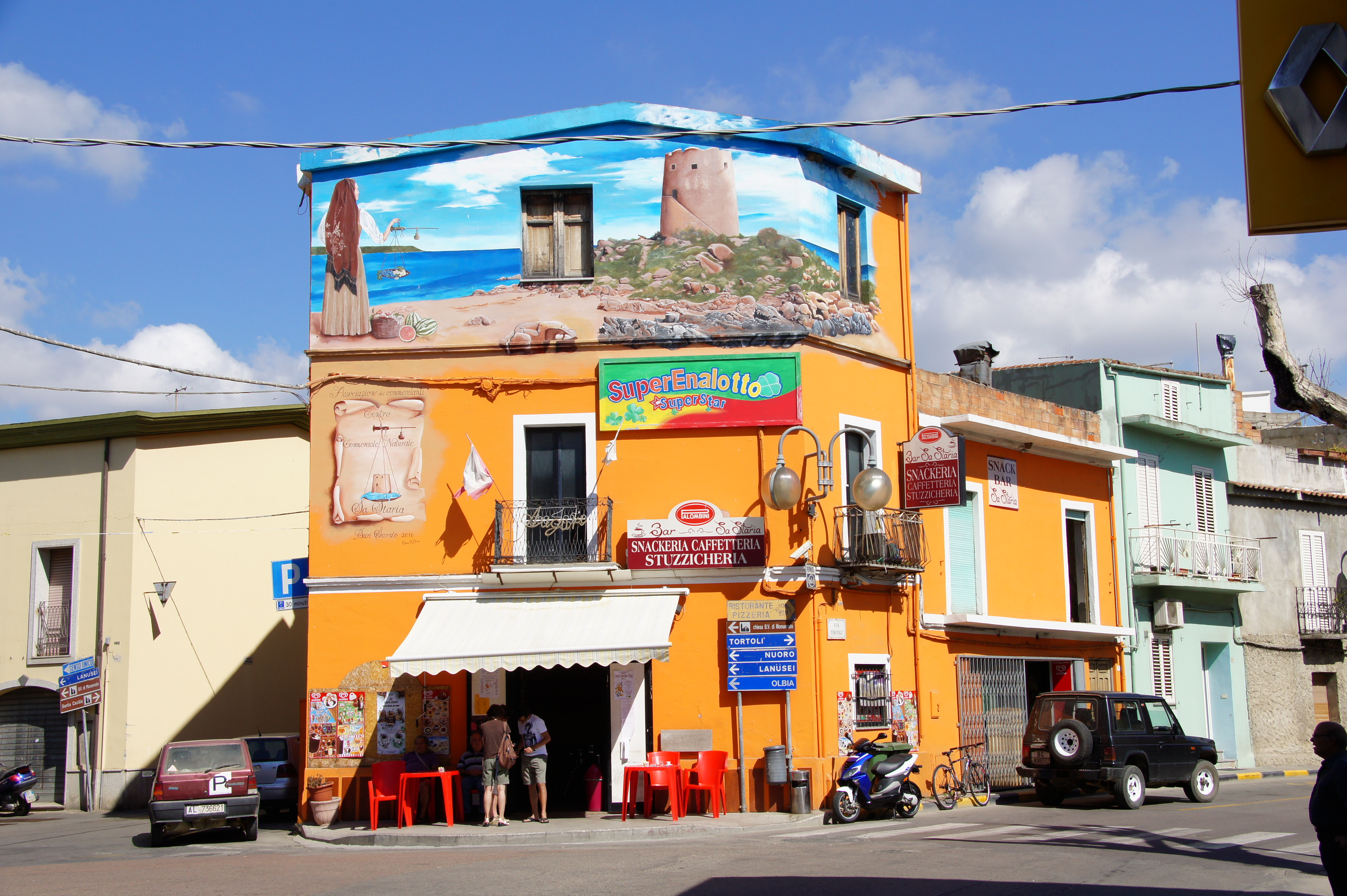 Hauptkreuzung von Barisardo mit Wegweisern nach Tortoli und Nuoro